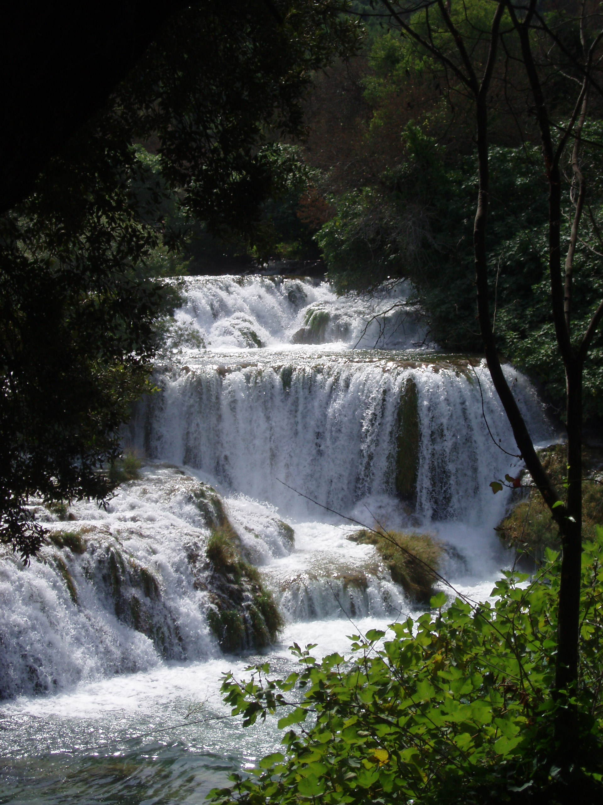 Krka National Park